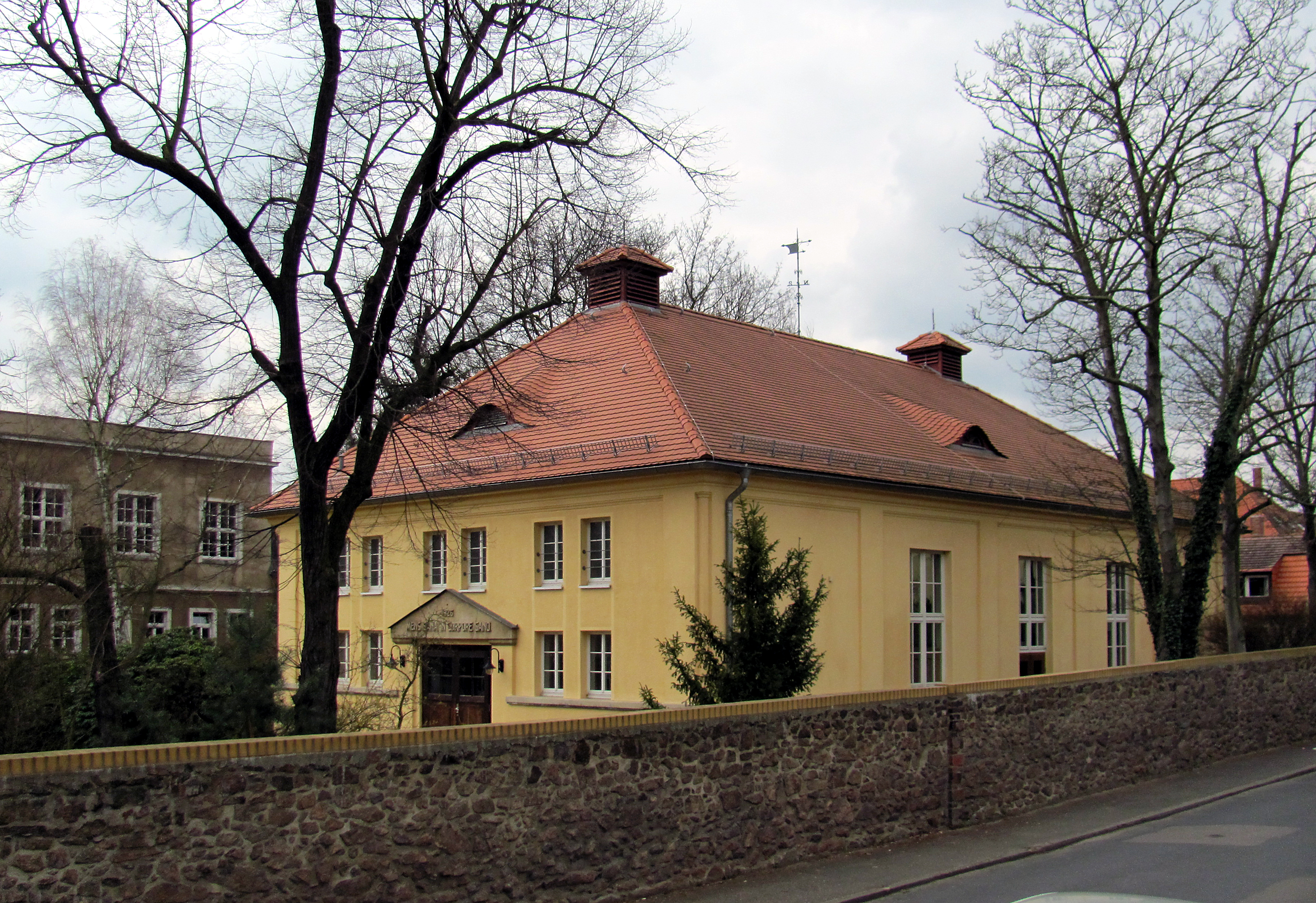 Radebeul-Niederlößnitz, Gymnasium Luisenstift, Turnhalle